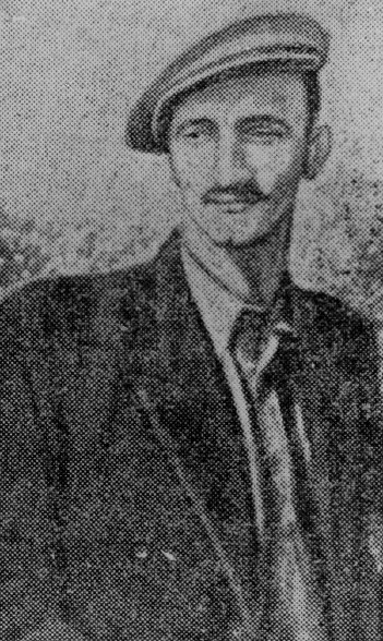 חיים ילין, מפקד "ארגון המאבק האנטיפשיסטי" בגטו קובנה.